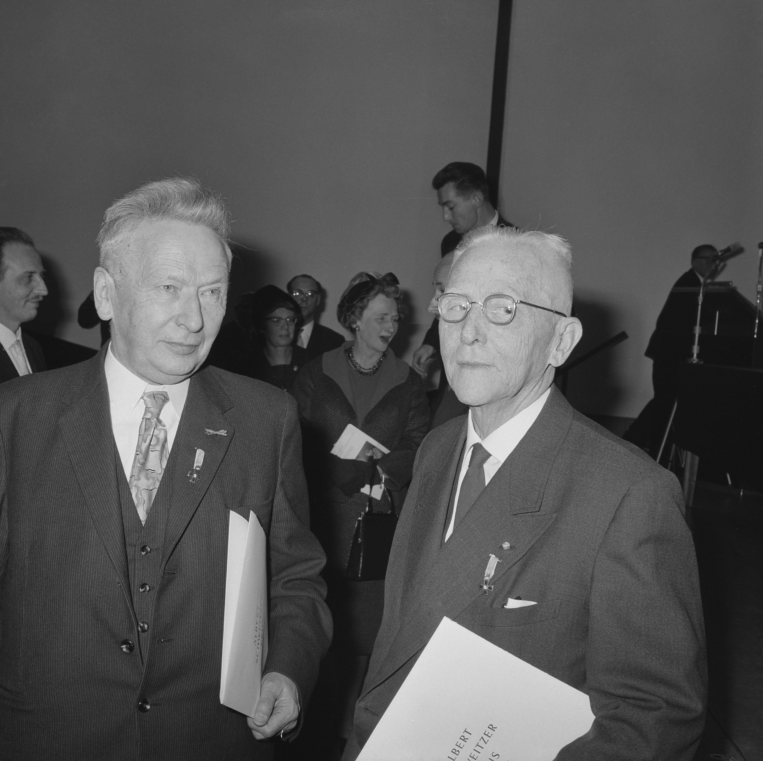 Collectie / Archief : Fotocollectie Anefo Reportage / Serie : [ onbekend ] Beschrijving : De Albert Schweitzerprijs , uitgereikt aan prof. dr. W. Banning , rechts dr. H. de Rook Datum : 12 januari 1963 Persoonsnaam : Banning, W., Dr. H. de Rook Fotograaf : Nijs, Jac. de / Anefo Auteursrechthebbende : Nationaal Archief Materiaalsoort : Negatief (zwart/wit) Nummer archiefinventaris : bekijk toegang 2.24.01.03 Bestanddeelnummer : 914-7054